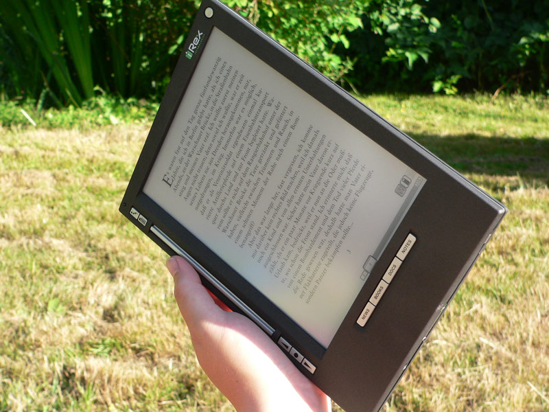 Iliad device